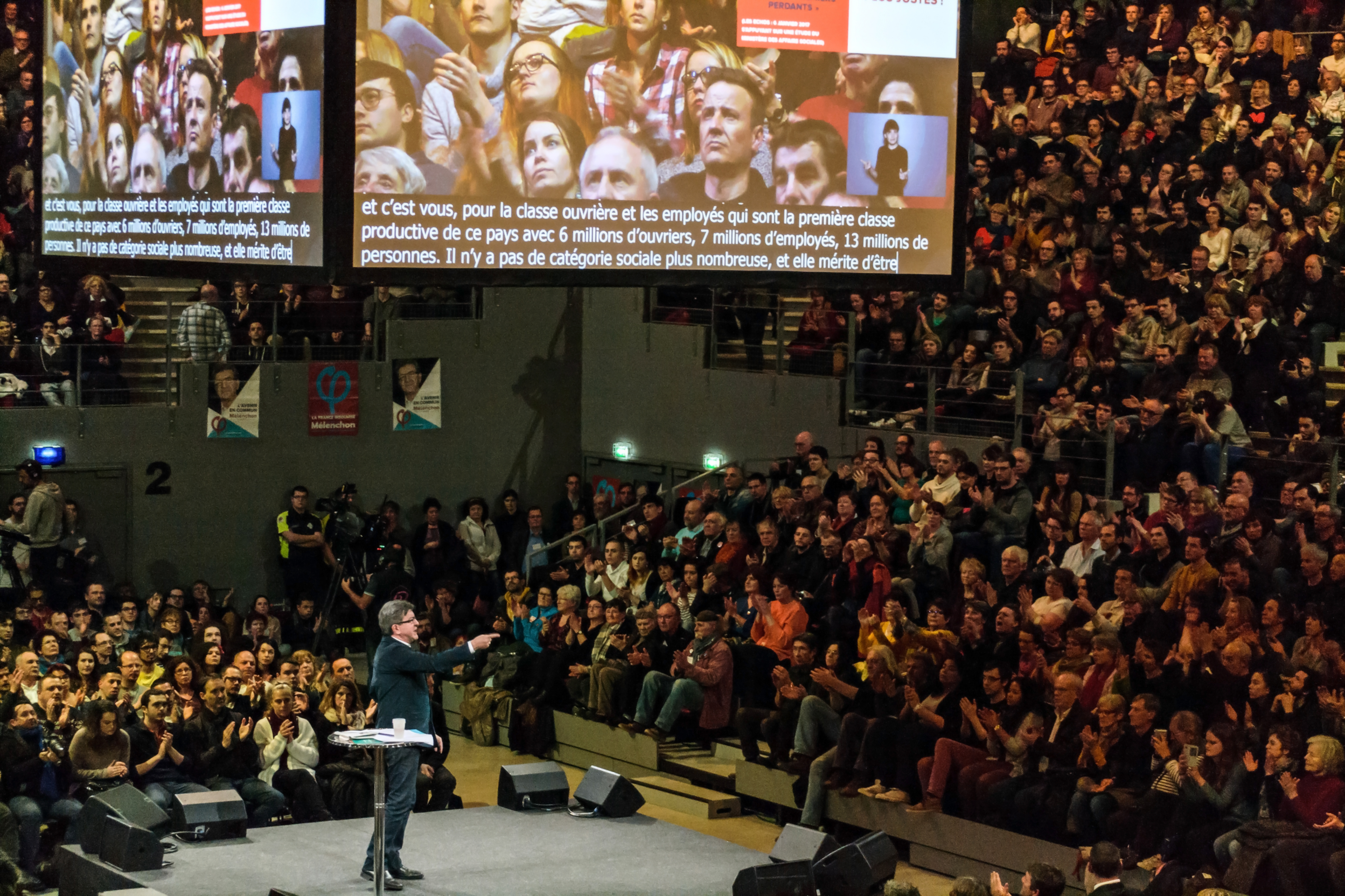 Réunion publique de Jean-Luc Mélenchon à Brest (Brest Arena) devant 4000 personnes le 28 février 2017 dans le cadre de l'élection présidentielle.